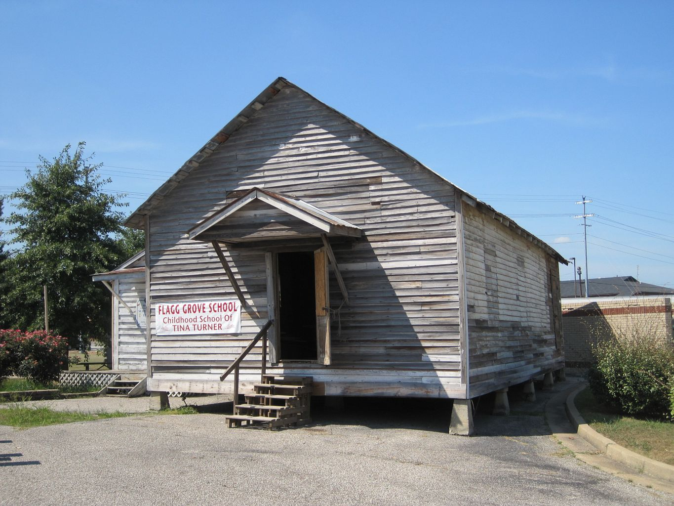 Flagg Grove School House (West Tennessee Delta Heritage Center)